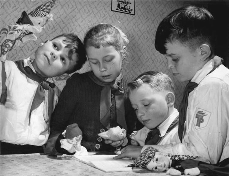 Jesewitz, Junge Pioniere beim Puppenspiel Zentralbild Schaar 27.1.1960 Jesewitzer überbieten den Plan 1960 Den Produktionsplan für 1960 zu überbieten und bis 1961 Westdeutschland in allen Positionen der Viehwirtschaft zu übertreffen, beschlossen die Bauern der Gemeinde Jesewitz im vollgenossenschaftlichen Kreis Eilenburg, bei denen vor wenigen Tagen der Erste Sekretär des ZK der SED, Walter Ulbricht, weilte. Zur Sicherung einer guten Futtergrundlage werden in Jesewitz in diesem Jahr 15 Prozent der Ackerfläche mit Mais und 34 Prozent mit Zwischenfrüchten bestellt. Hier einige Beispiele aus dem Kampfziel der Gemeinde Jesewitz: Plan 1960 Ziel 1960 West-deutschland Dänemark Kinder je 100 ha 77 85 85 704 Kühe je 100 ha 38 40 39 45 Milch kg je Kuh 3200 3350 3408 3625 Schweine je 100 ha 148 155 103 175 UBz: Bei der Ausgestaltung des kulturellen Lebens im Dorf helfen auch die Jungen Pioniere des Dorfes. Klaus, Gabi, Werner und Gerd üben ein Puppenspiel ein.